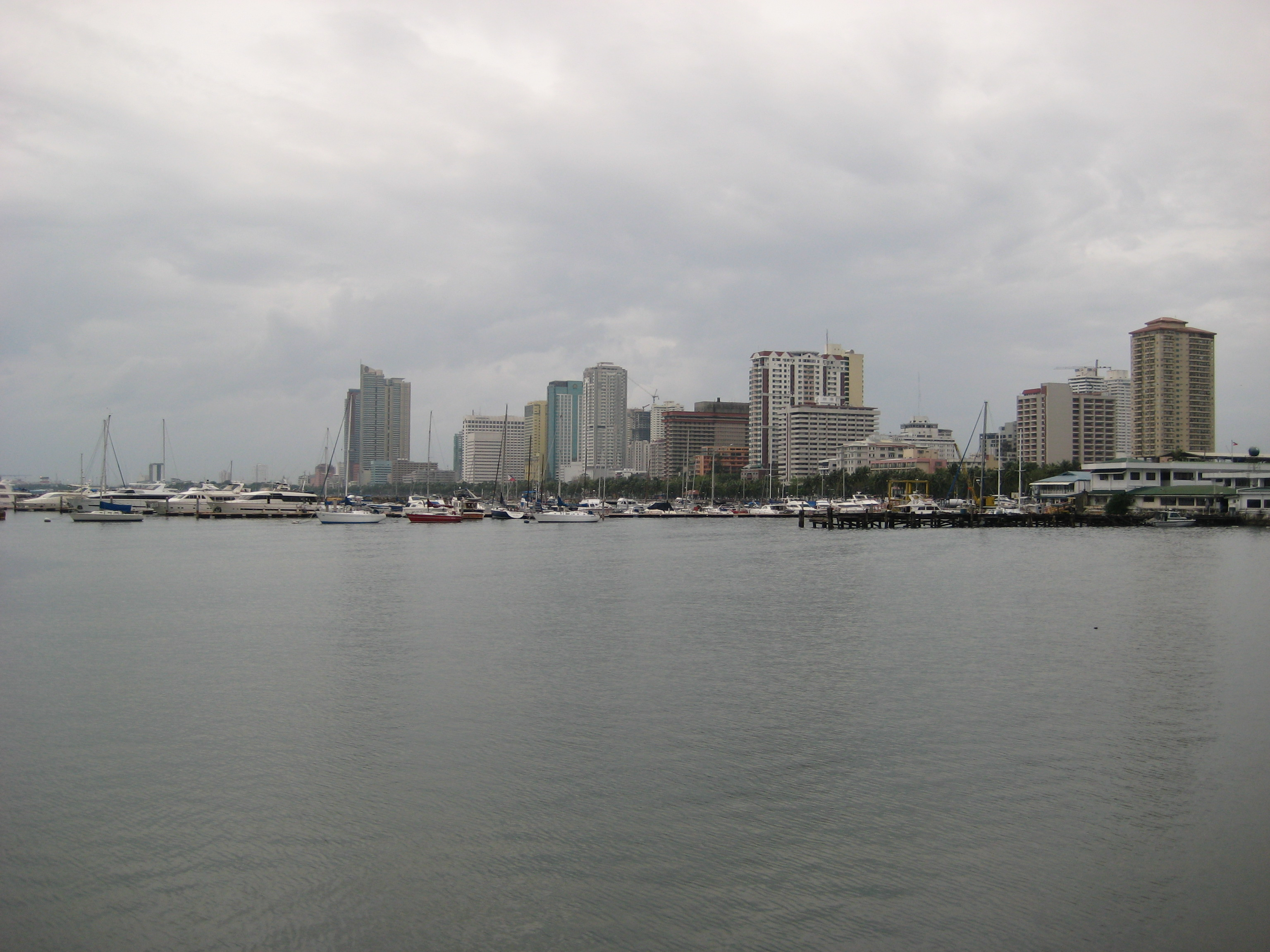 Vista de la bahía de Manila, Filipinas